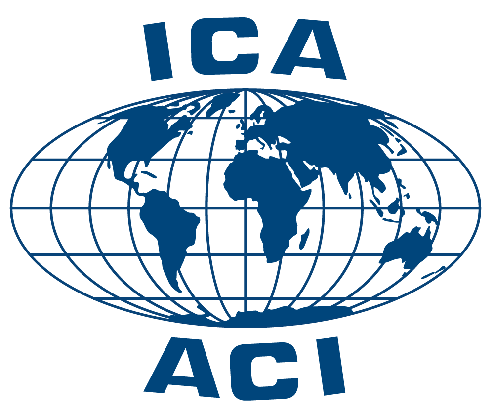 Oficiální logo ICA